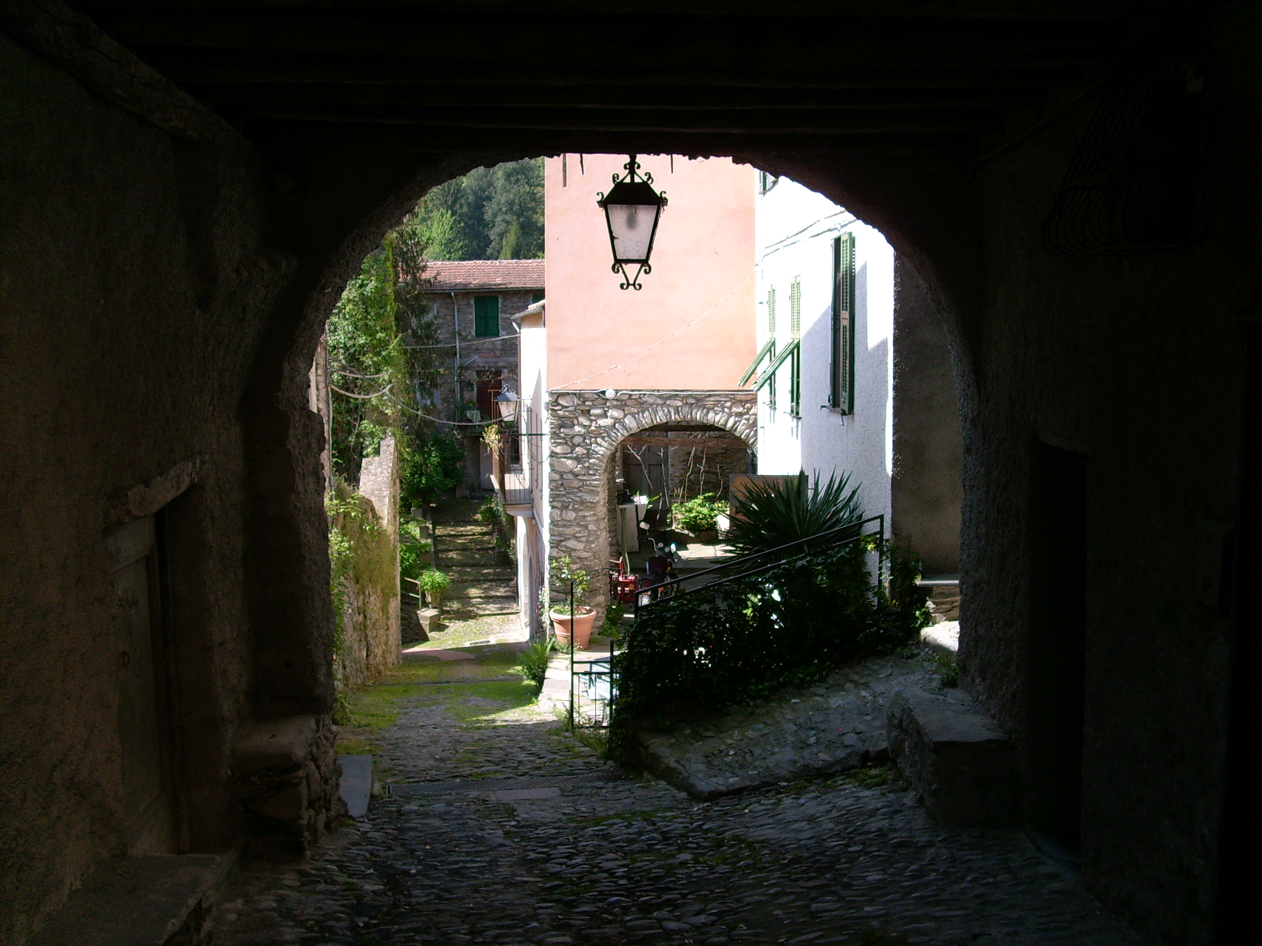 Molini di Triora, Liguria, Italia